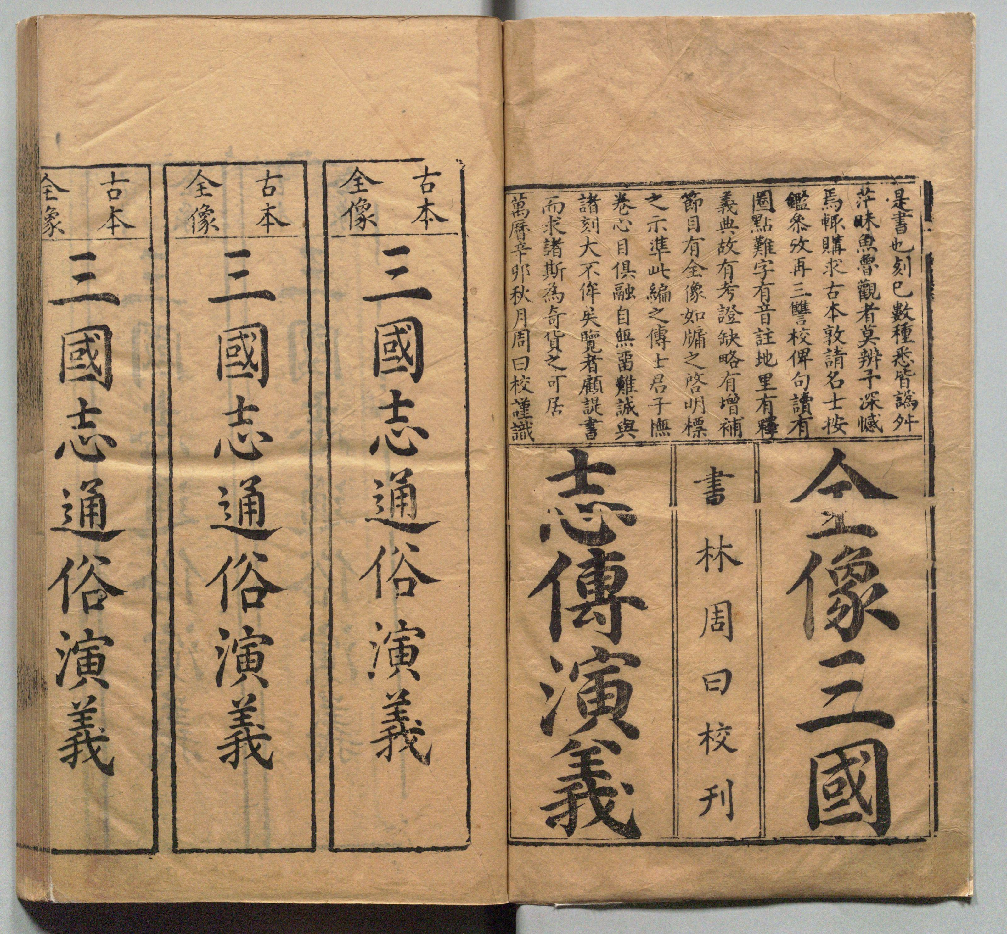 《新刊校正古本大字音释三国志通俗演义》 明万历十九年书林周曰校刊本